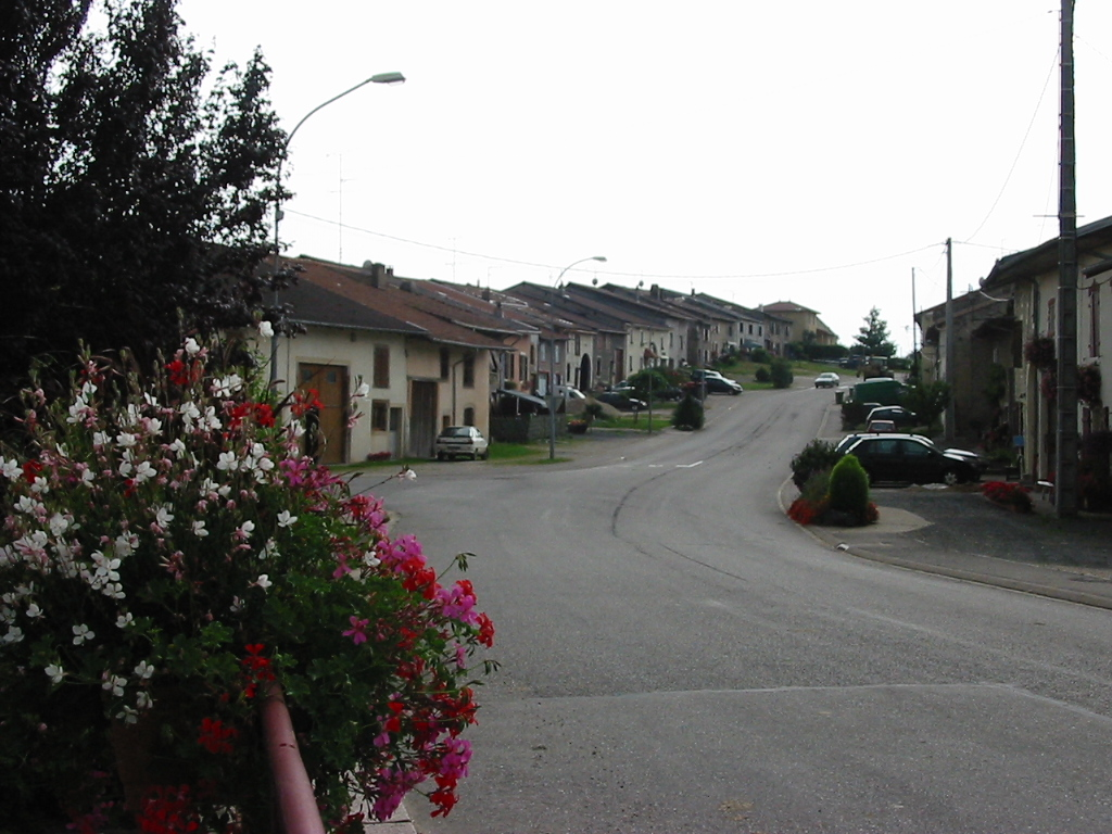 Rue Grandjacquot à Fraimbois (Meurthe-et-Moselle)